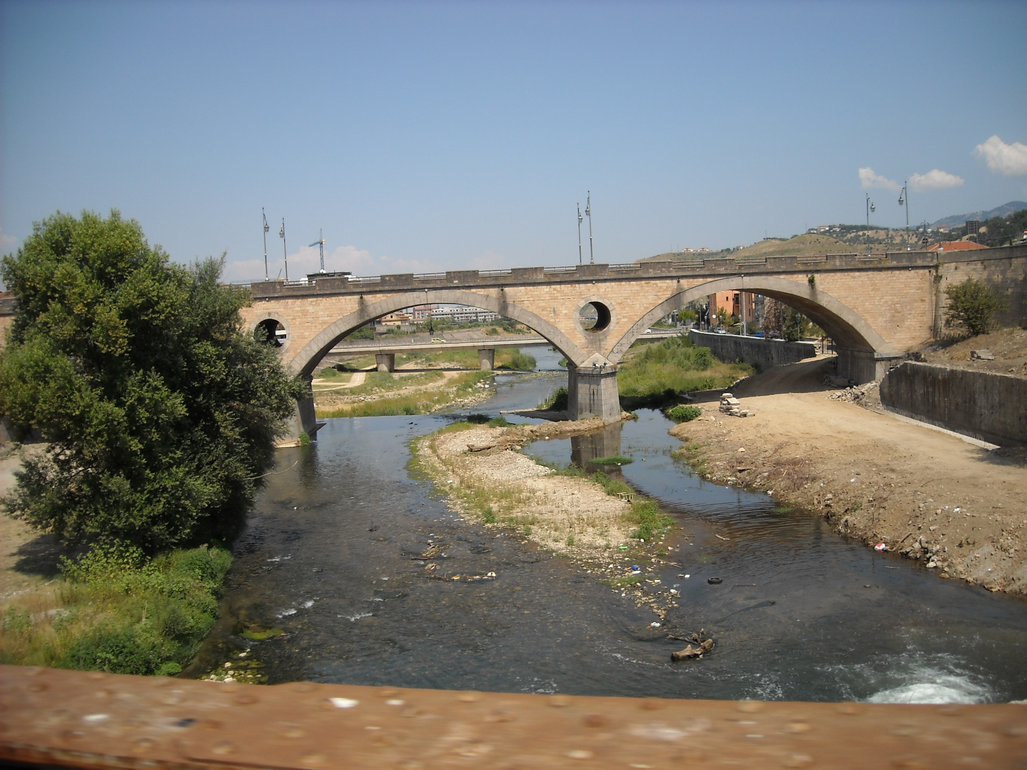 Tratto tra Cosenza Casali e Cosenza Centro sul fiume Crati